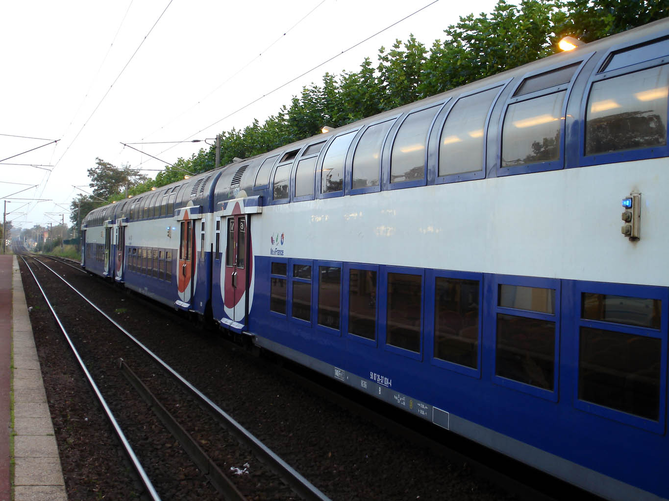 Gare de Taverny (Val-d'Oise), France